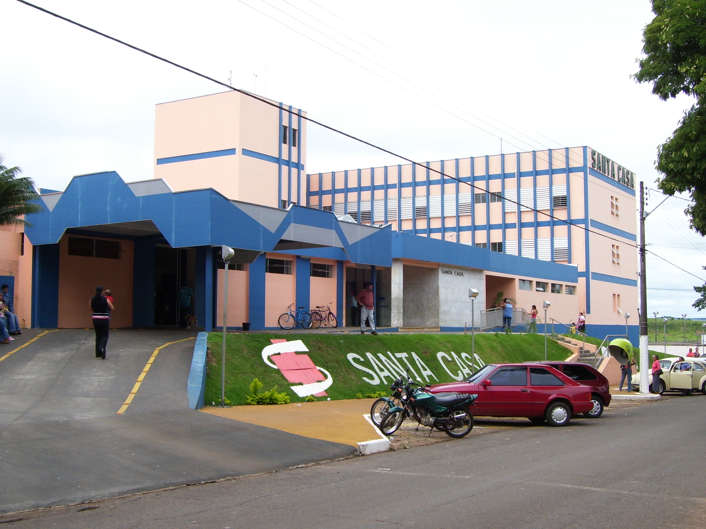 Santa Casa de Misericórdia, Itararé, São Paulo, Brasil.